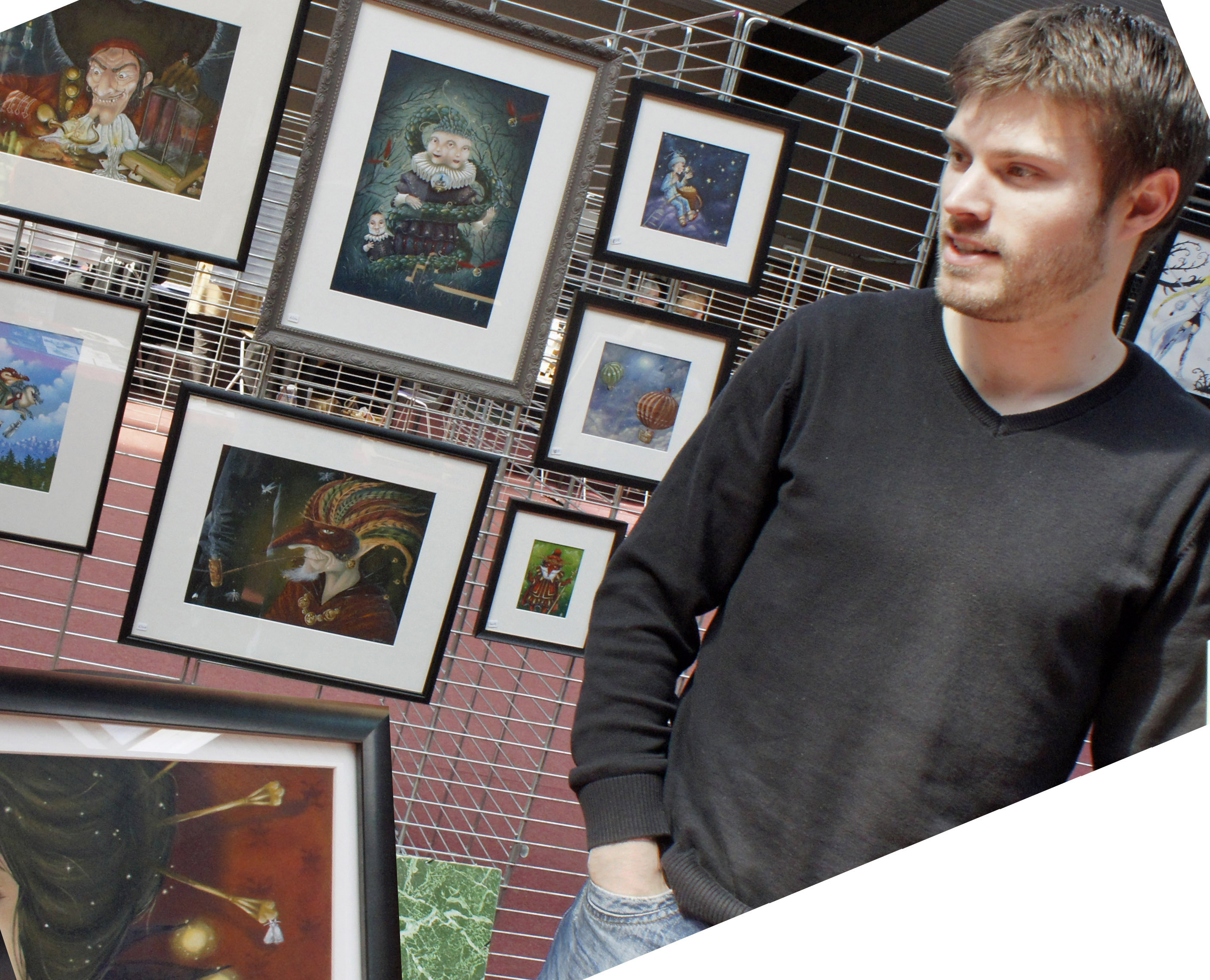 Alexandre Honoré présent au Printemps des Légendes 2012.